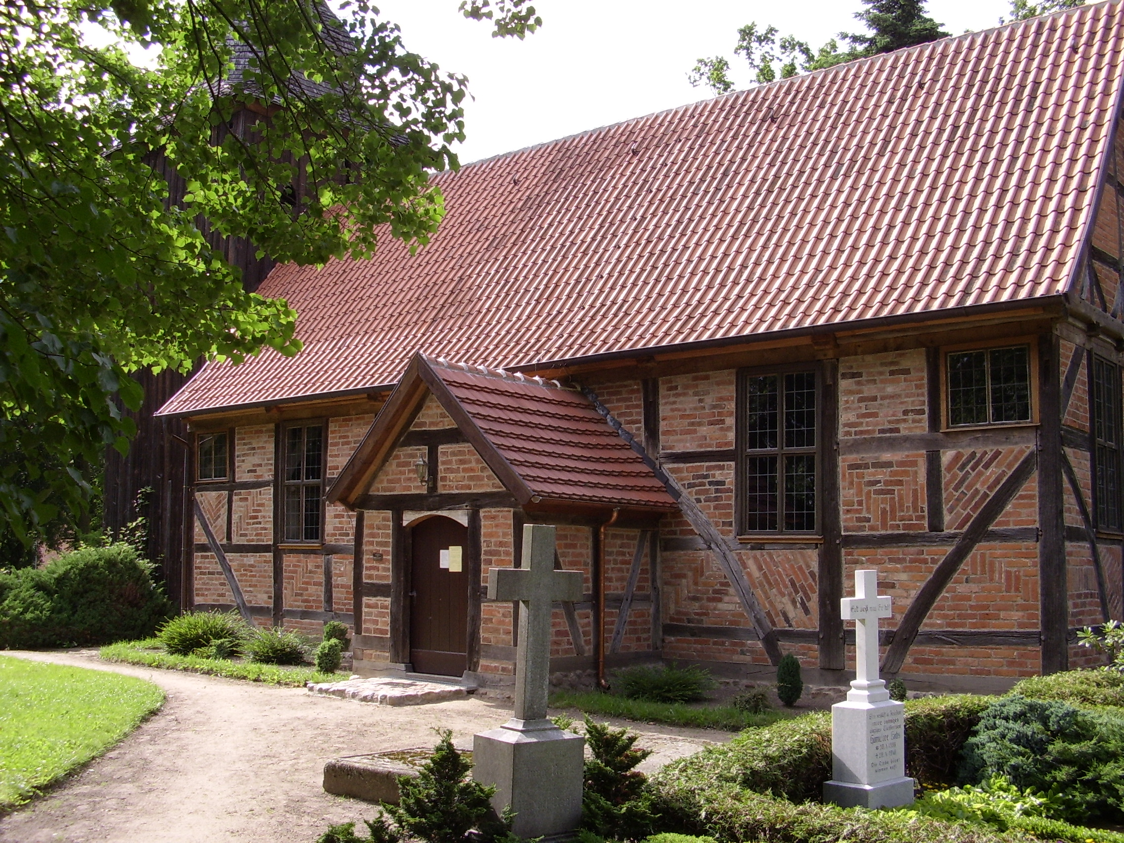 Fachwerkkirche Dammwolde